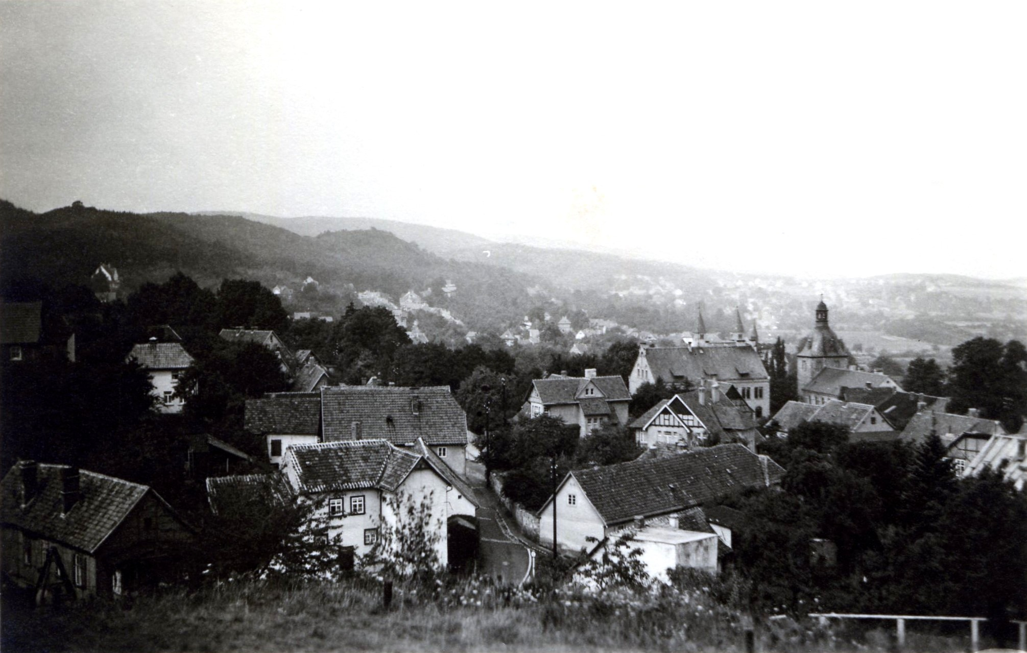 Blick auf Gernrode, wohl vom Osterberg, im August 1940